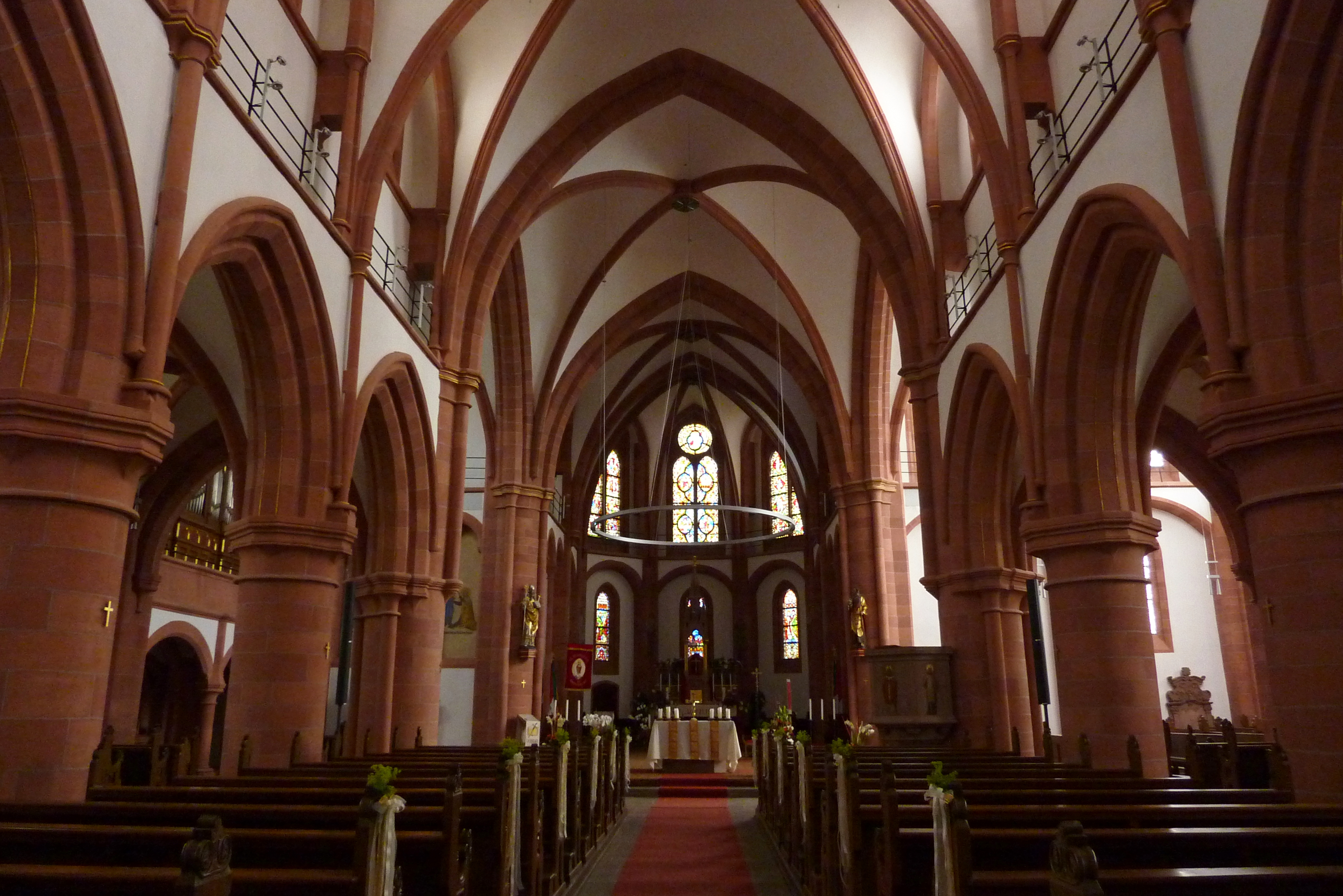 Katholische Pfarrkirche, ehemalige Stiftskirche, St. Johannes der Täufer in Amöneburg im Landkreis Marburg-Biedenkopf (Hessen), Innenraum mit Blick zum Chor